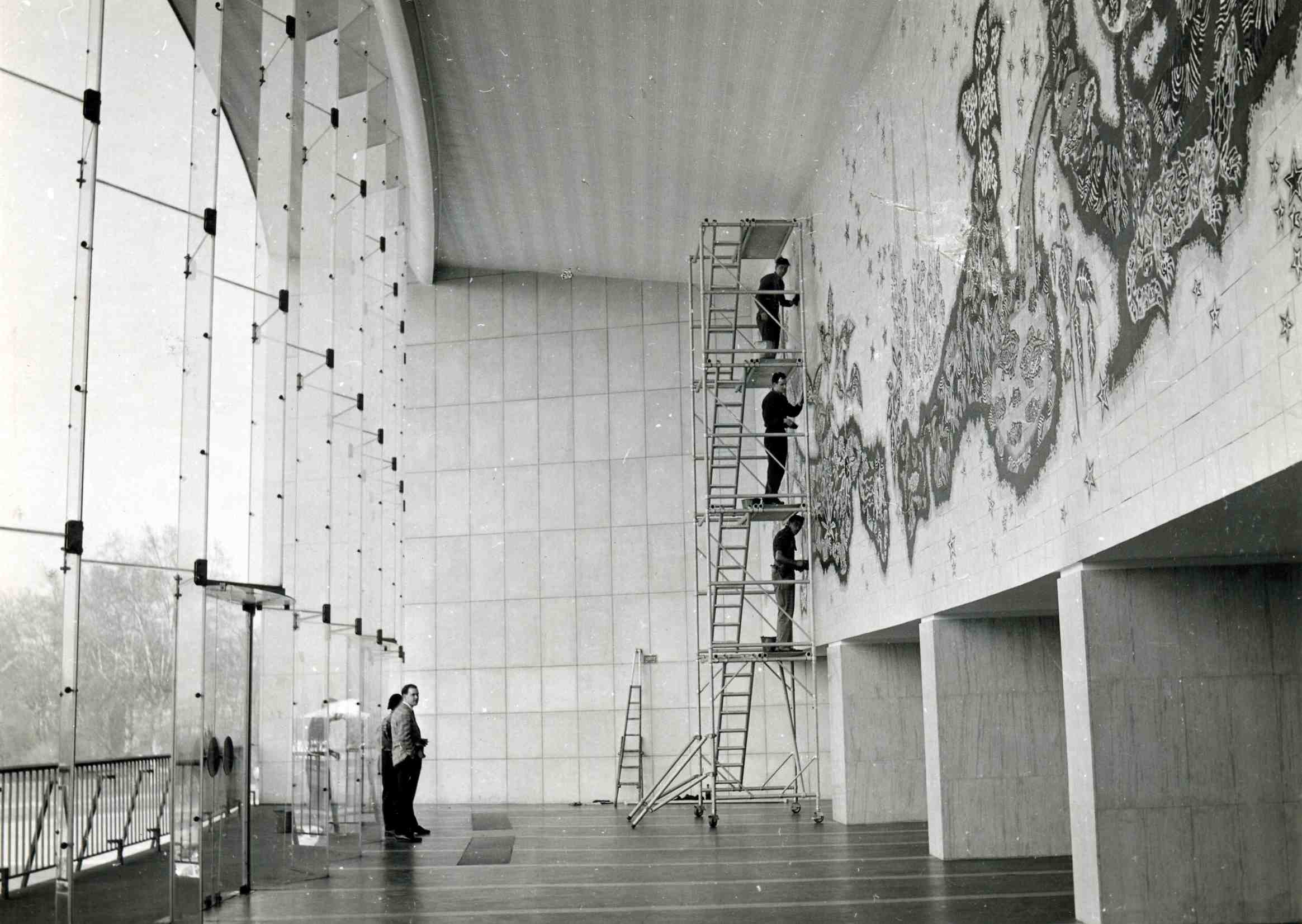 Une entreprise de nettoyage locale intervient sur la céramique de Jean Lurçat, La Création du Monde, installée à la Maison de la Radio de Strasbourg en 1961